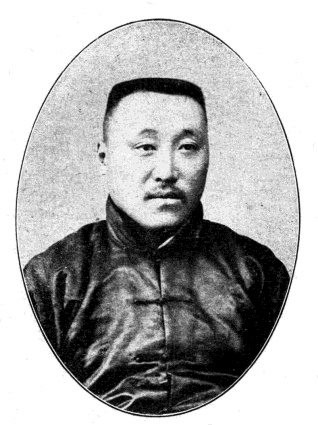 中文（台灣）: 中華民國國會議員